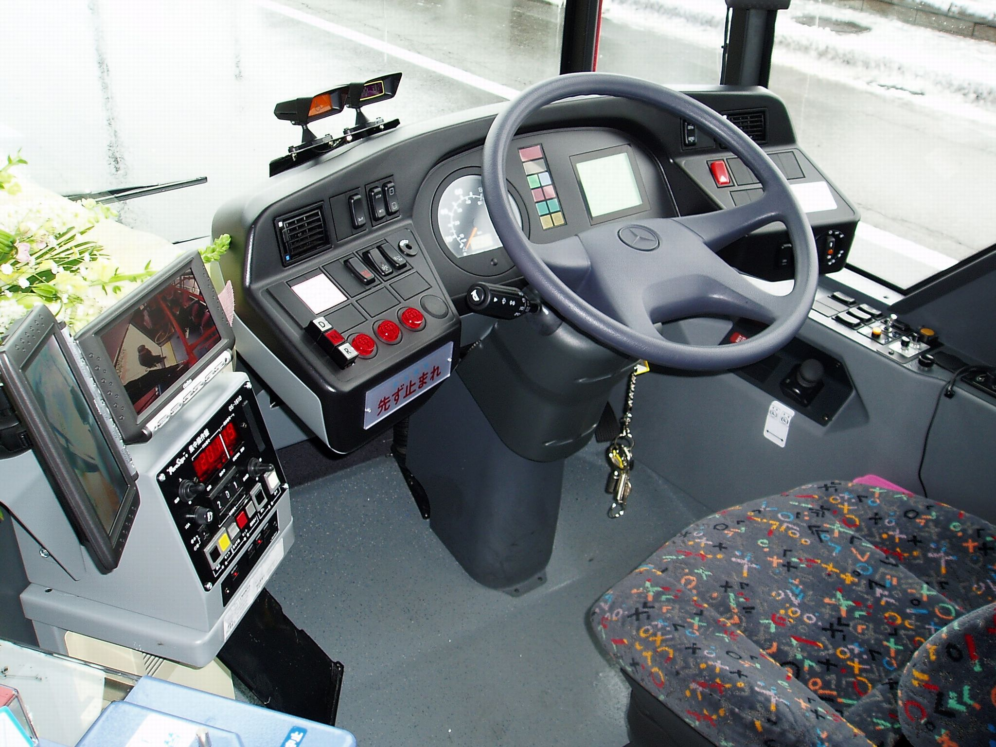 Kanachu A201 （あ201） "Twin Liner" Mercedes-Benz O530 "CITARO G", built 2007 at Atsugi AXT